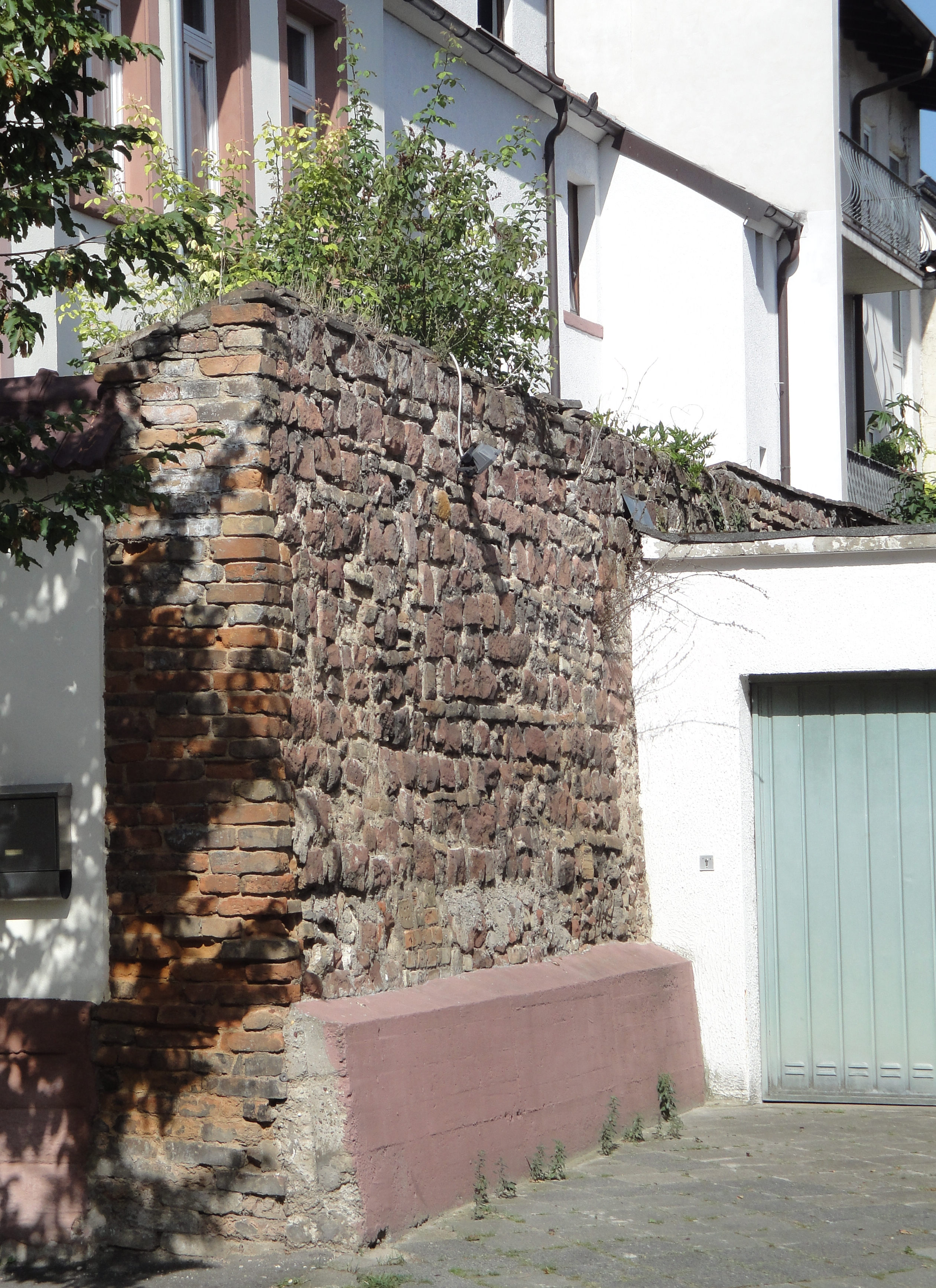 Ende der Stadtmauer in der Zeppelinstrasse 1-9 in Speyer